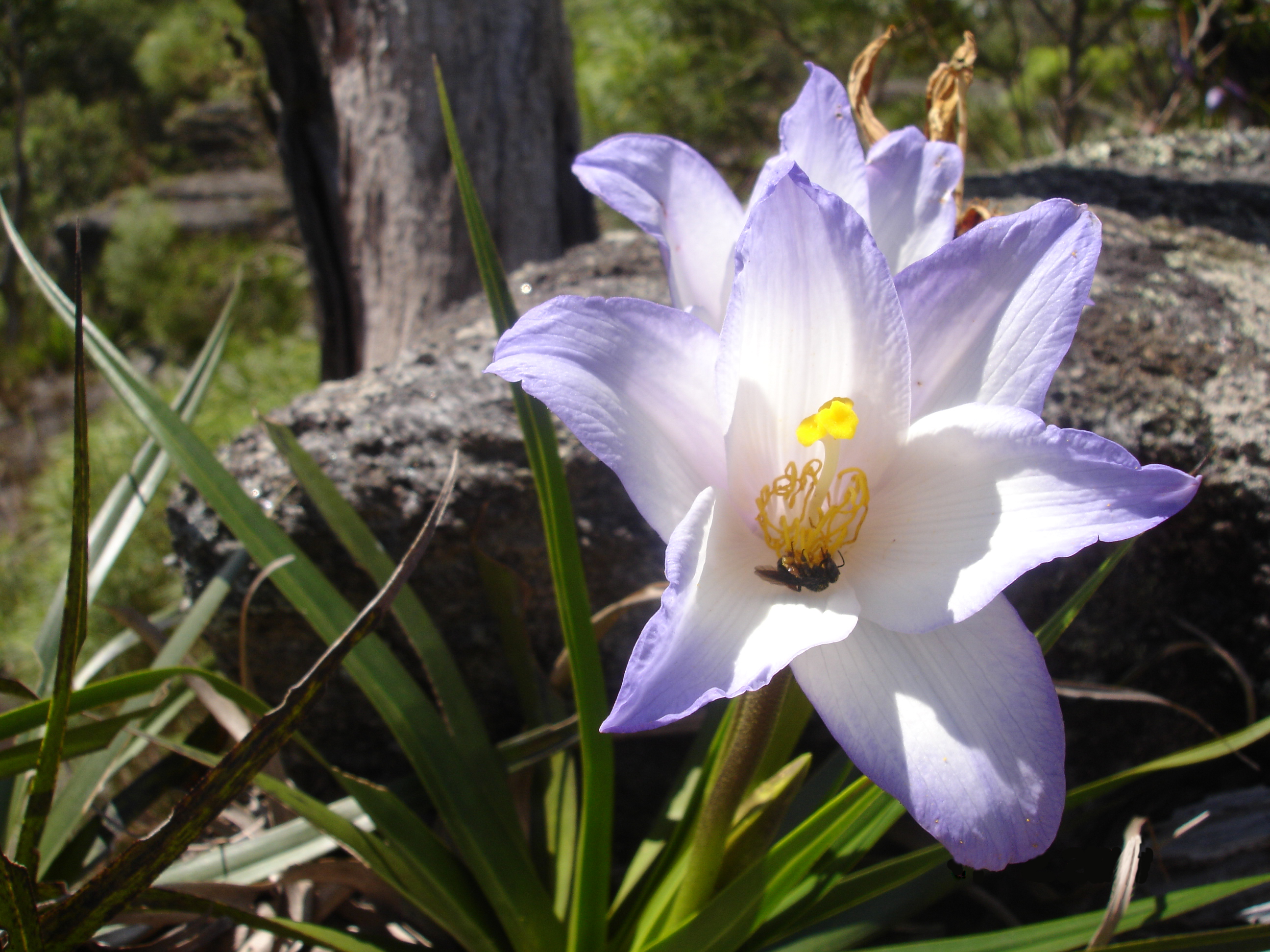 Uma Vellozia sp. de de no Parque Estadual do Ibitipoca, estado de Minas Gerais, Brasil